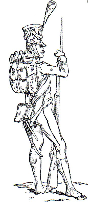 Tiragliatore della Vecchia Guardia